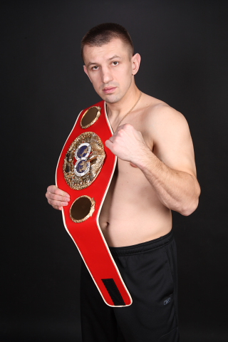 Tomasz Adamek - polski bokser, mistrz świata